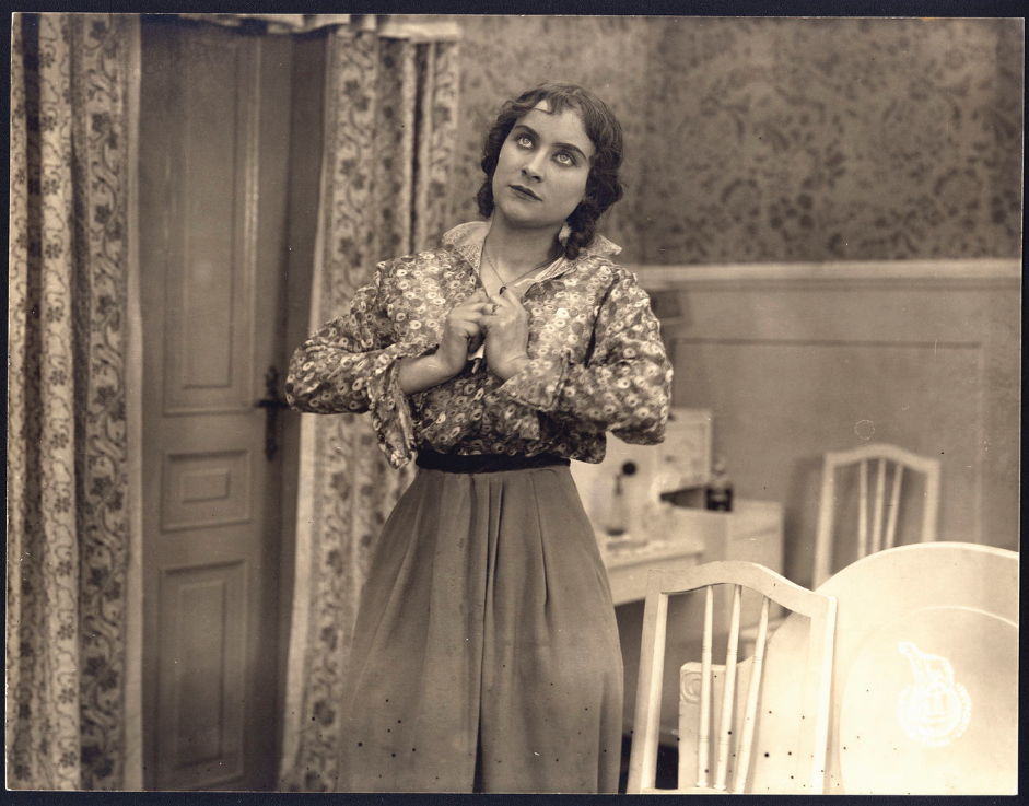 Bertha Nina Sommerfelt i stumfilmen "Hjertefejlen", København 1915